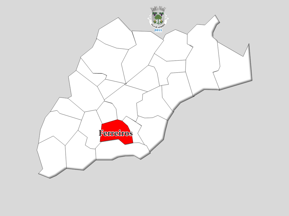 Censo 2011